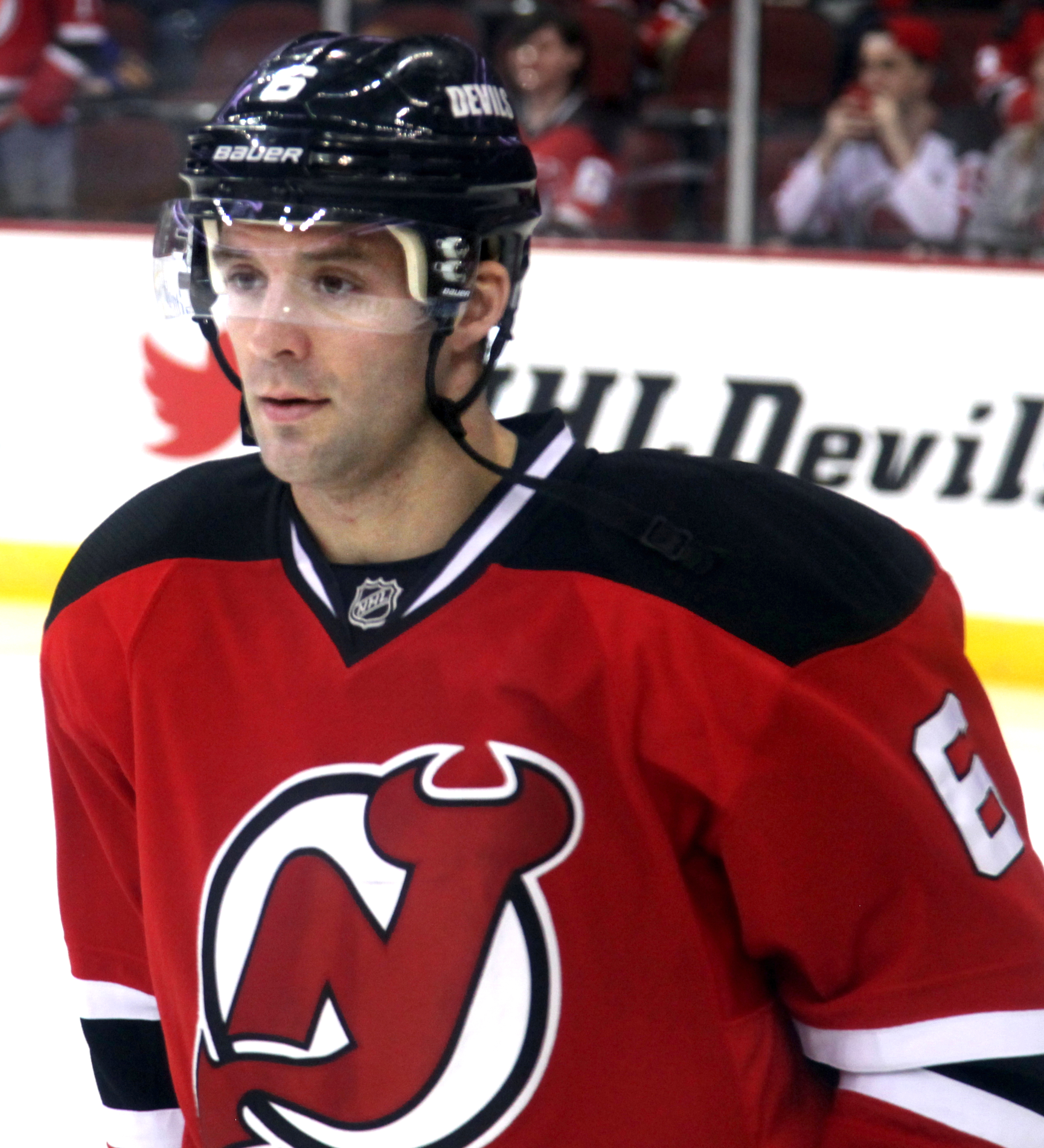 Greene in 2014.